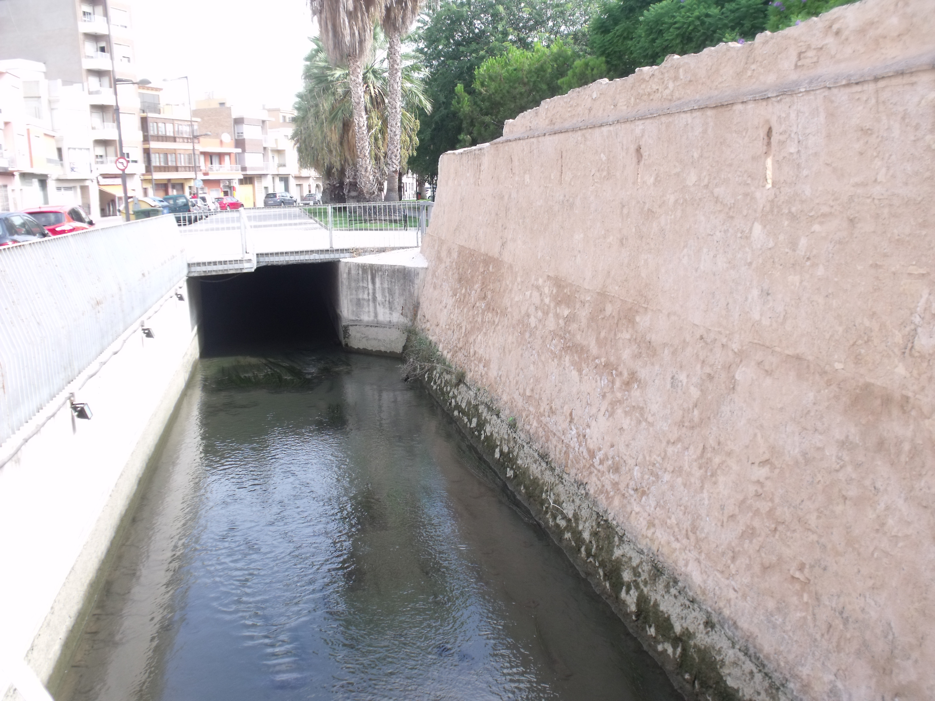 Fragmento de muralla elevada para las guerras carlistas.